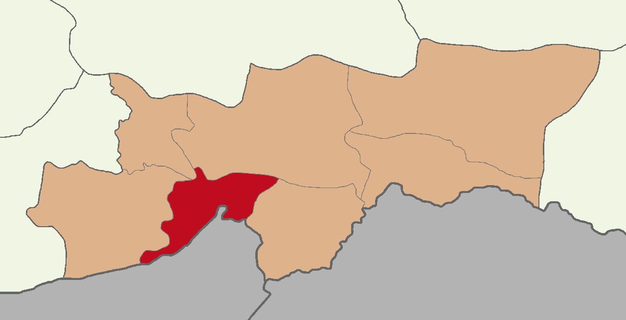 Cizre ilçesinin konumu